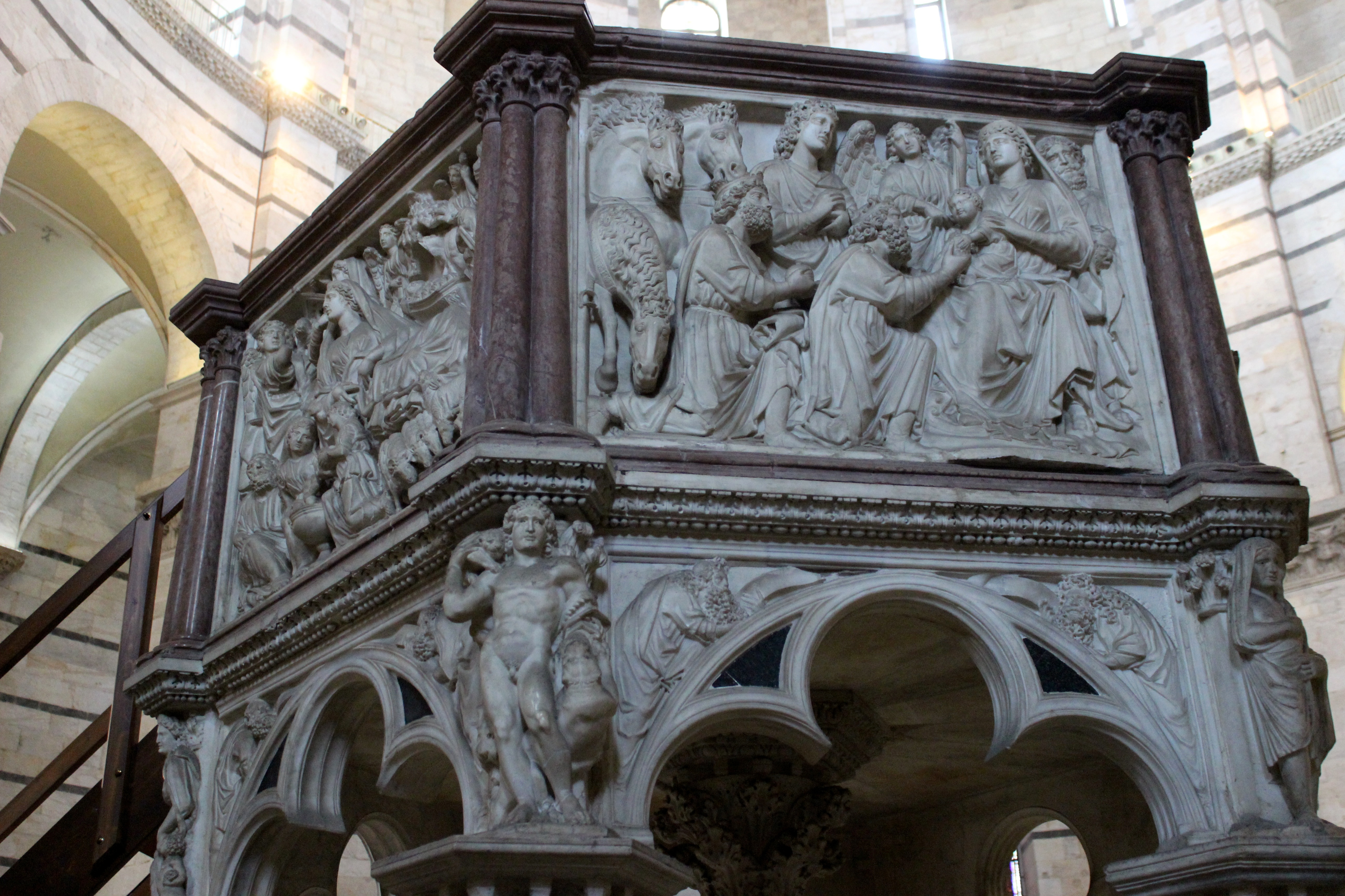 Púlpito del Baptisterio de Pisa